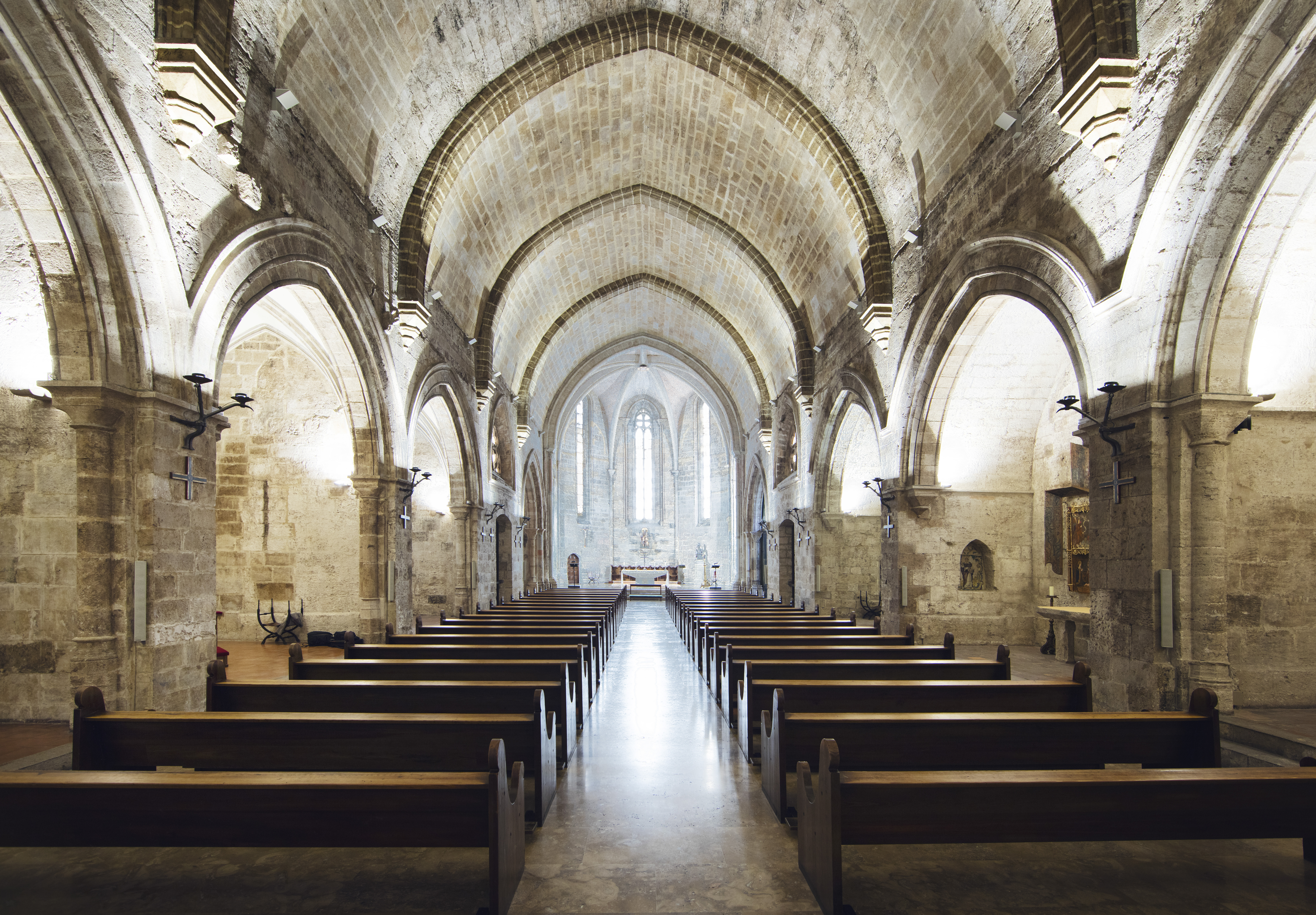 Ver